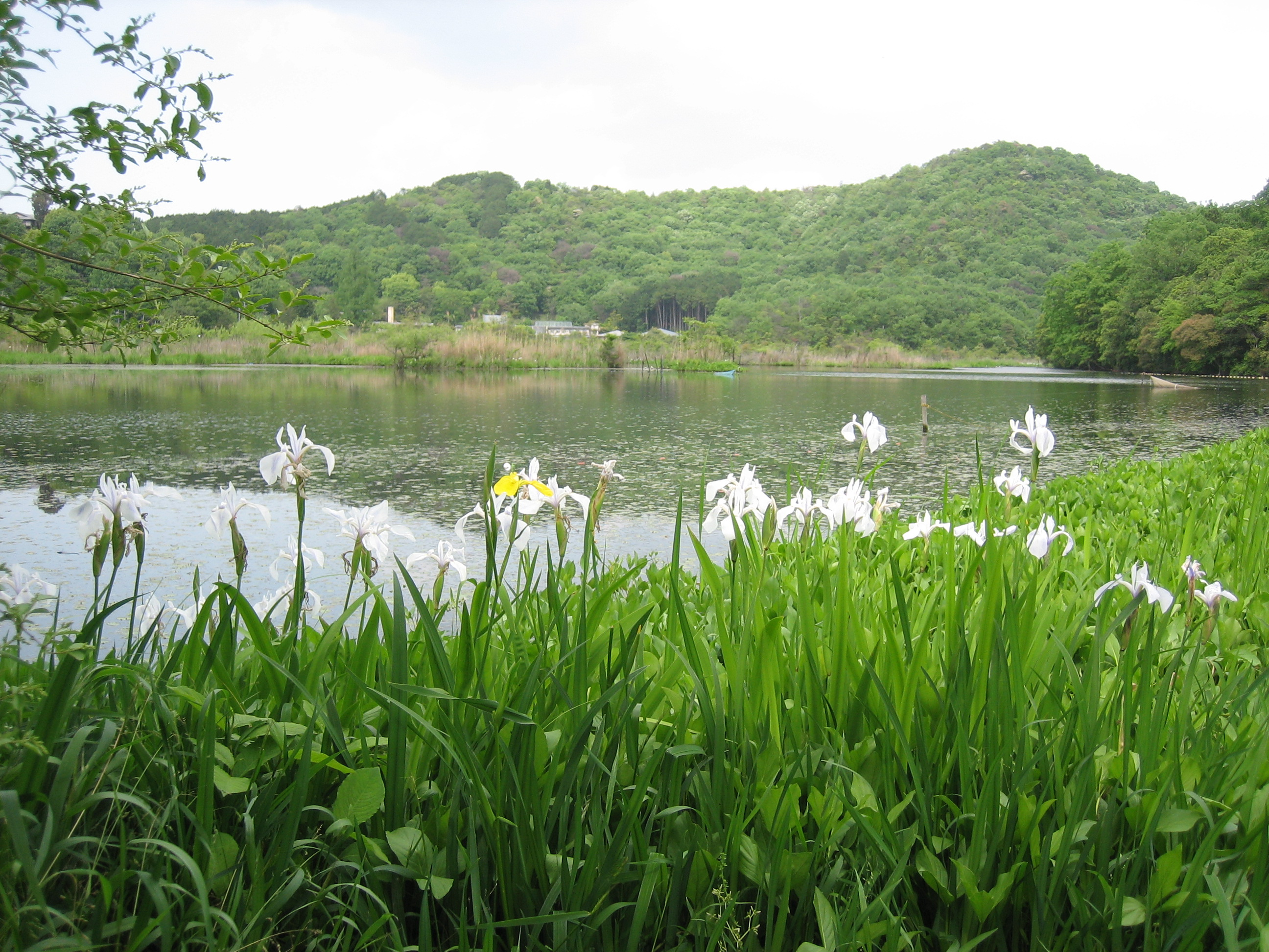 深泥池に咲く白いカキツバタを北区上賀茂狭間町から撮影